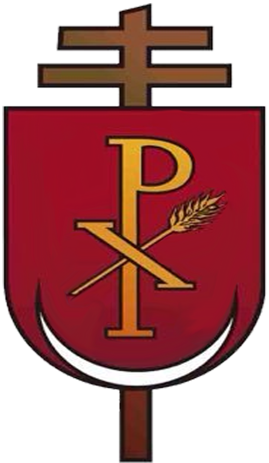 Escudo de armas de la Arquidiócesis de Valencia en Venezuela